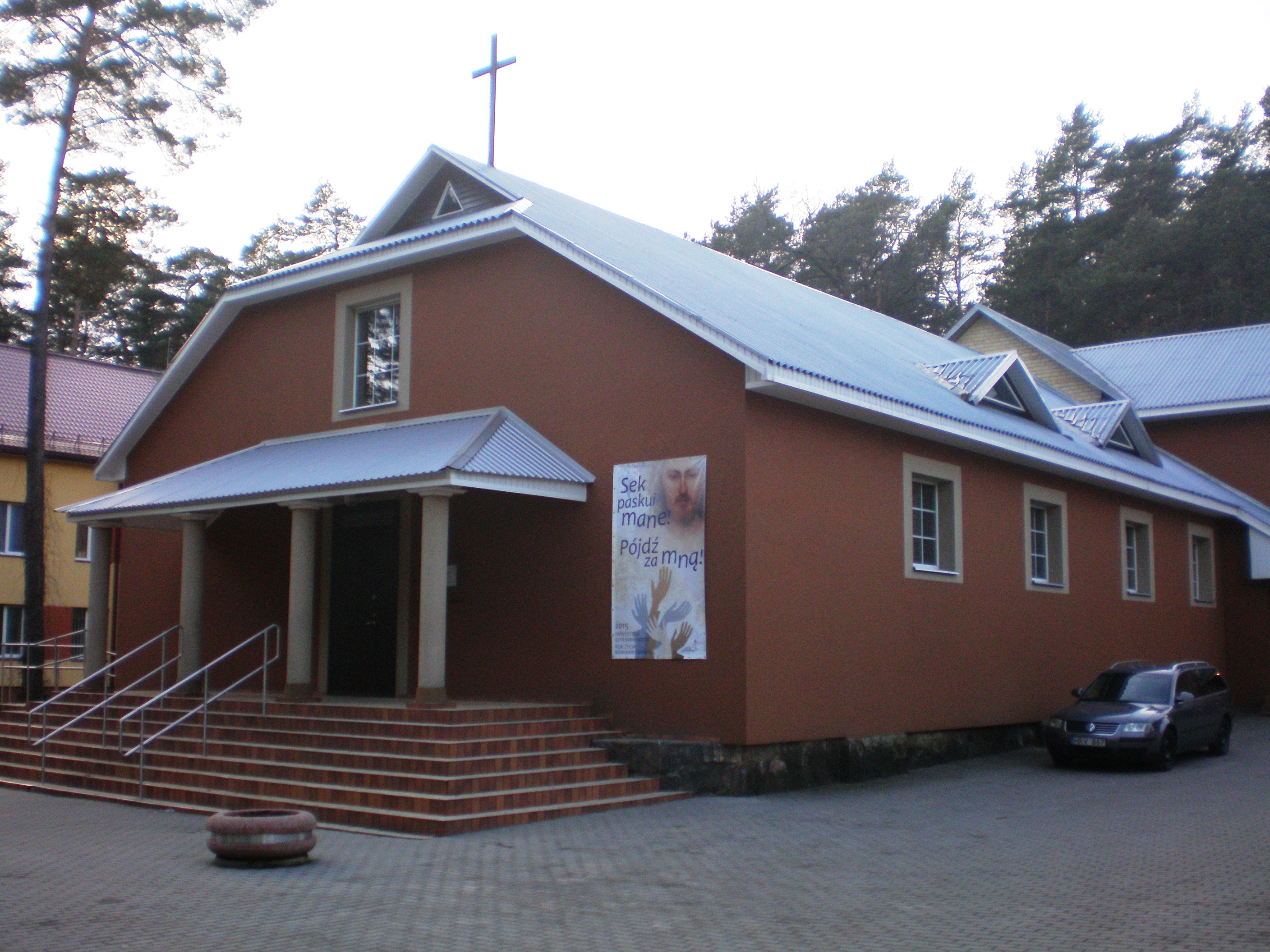 Juodšilių koplyčia, Vilniaus raj.